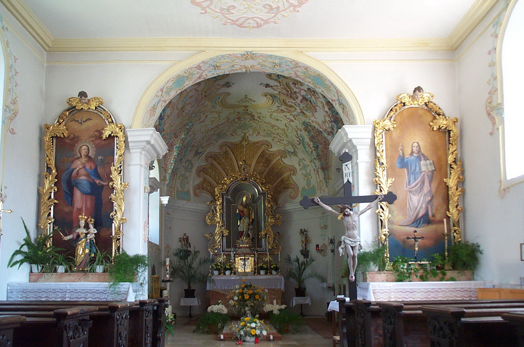 Herrngiesdorf, Bernhardstraße 23-25. Katholische Kirche St. Martin. Flachdecke im Langhaus mit einfachen Stuckarbeiten. Aufwendigere Stuckaturen im gewölbten Chor und in den Stichkappen. Barockaltar mit der Figur des Kirchenpatrons St. Martin. Im Chor befindet sich die Gruft von Bernhard Lehner, einem Sohn der Gemeinde der 1944 mit nur 14 Jahren starb und für dessen Seligsprechung seit den 50er Jahren gebetet wird.